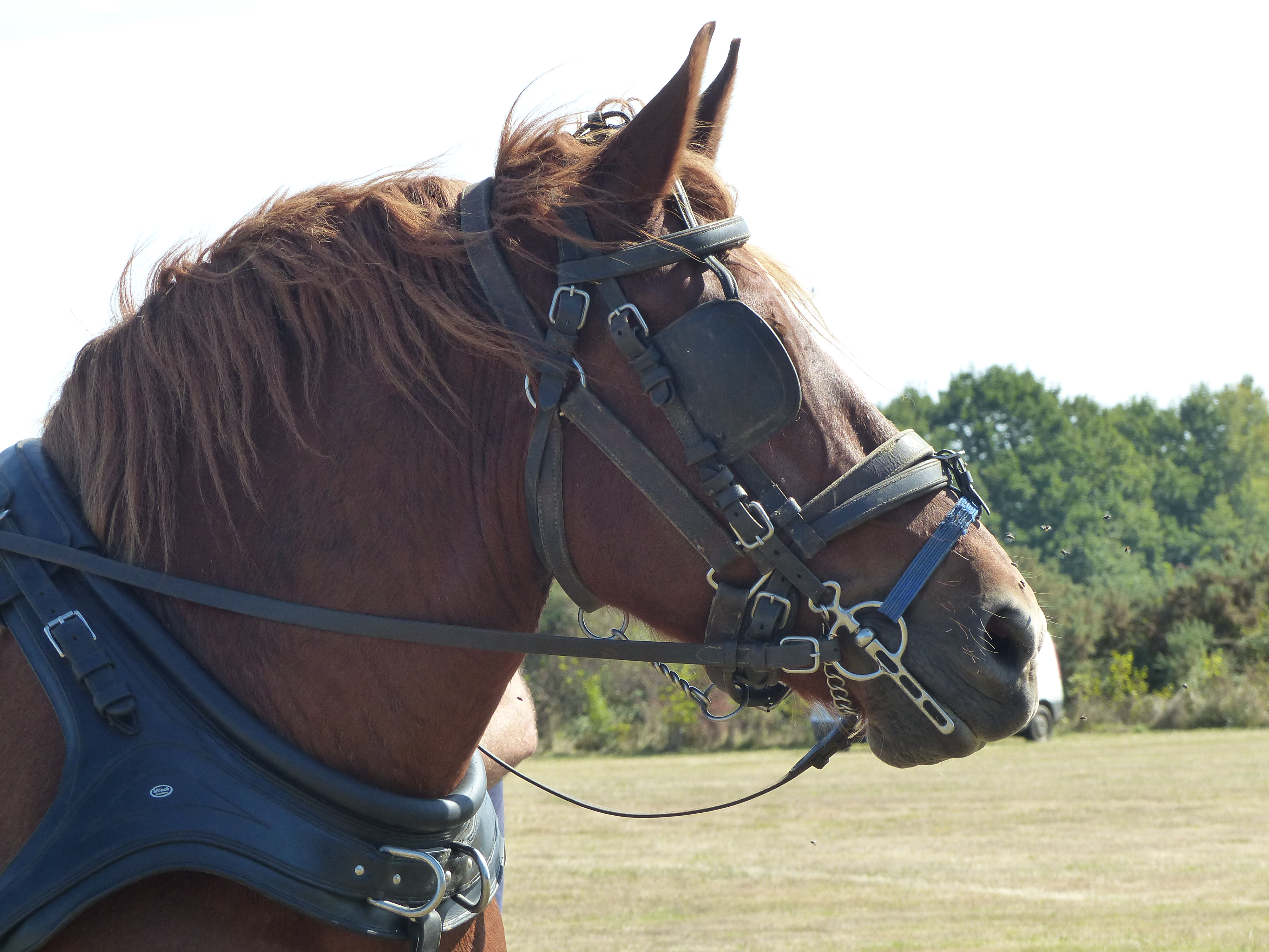 Jument trait Breton équipée pour la traction (œillères, mirs Liverpool, etc) à la Fête du cheval de l'âne et du poney à Rennes, La Prevalaye, septembre 2019.